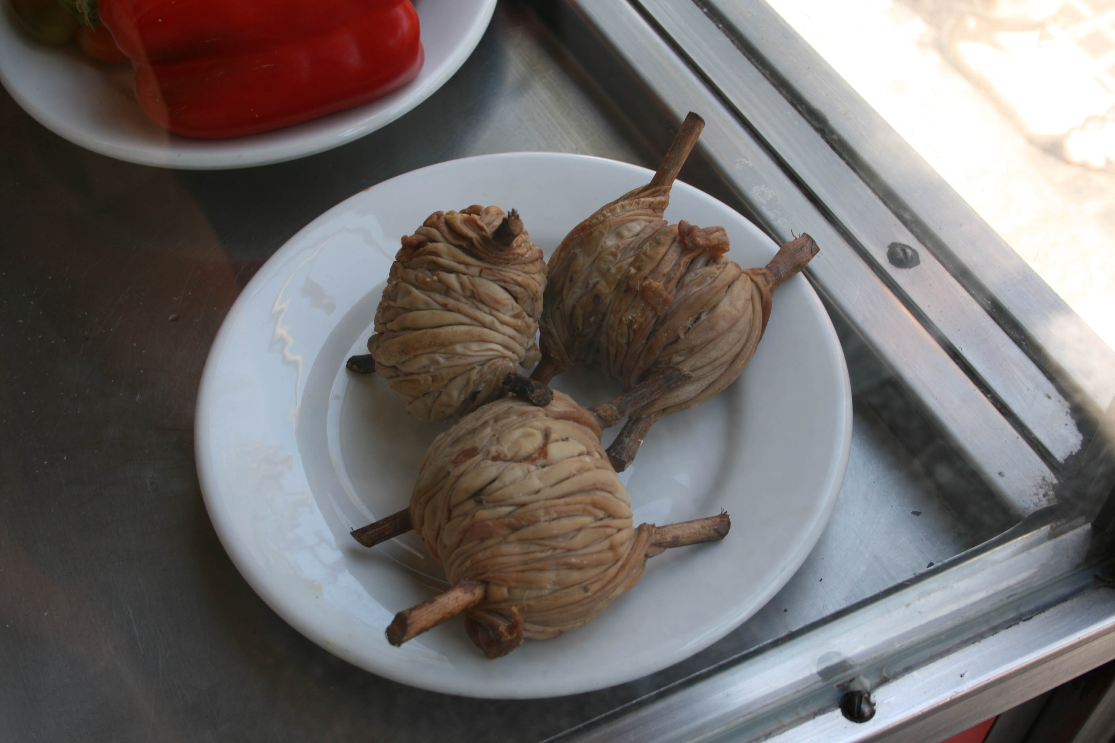 Plato de Zarajos (Tripas de cordero enlazadas sobre una rama de parra).